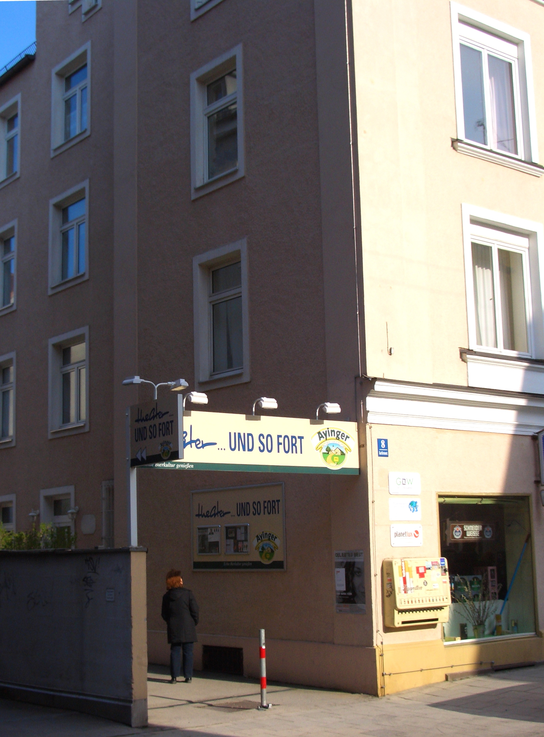 Theater... und so fort in Muenchen